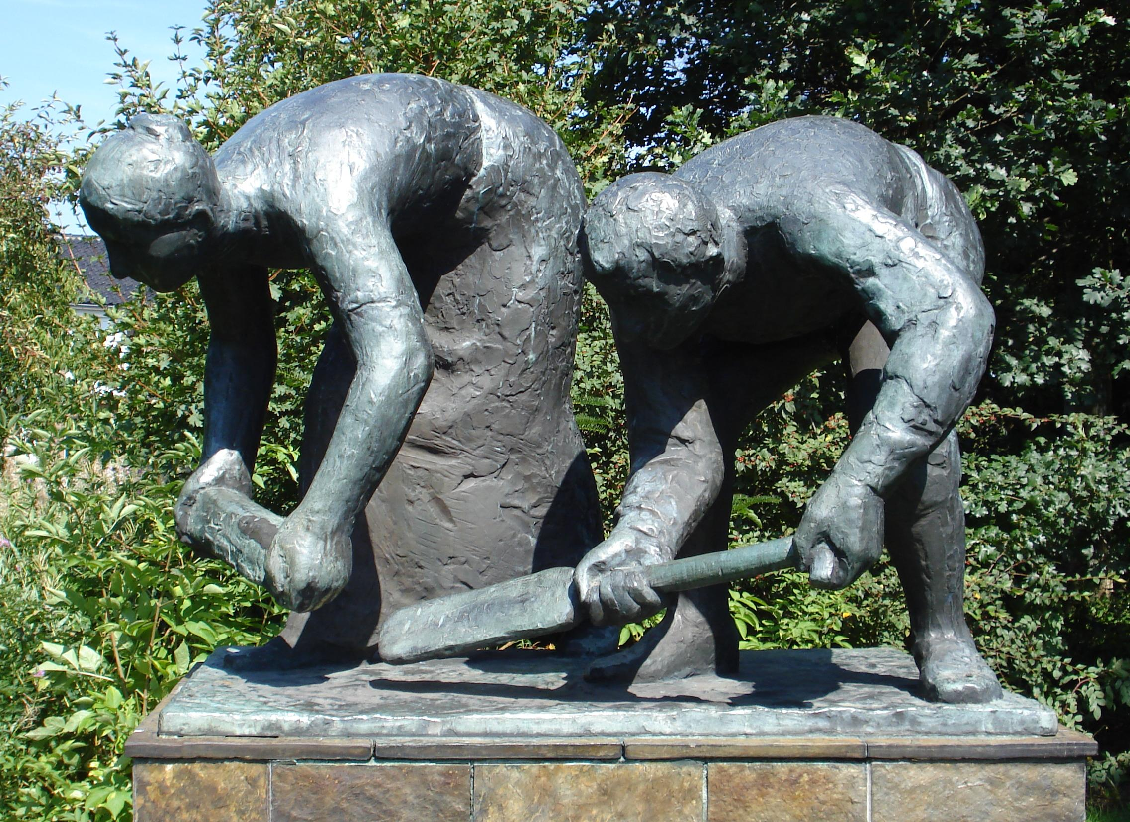 Hoogeveen, Burgemeester Tjalmapark. Kunstwerk "Turfgravers" van Han Wezelaar. Hoogeveen/The Netherlands.